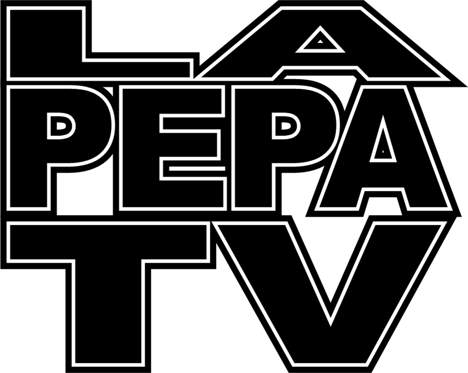 logotipo de 1995